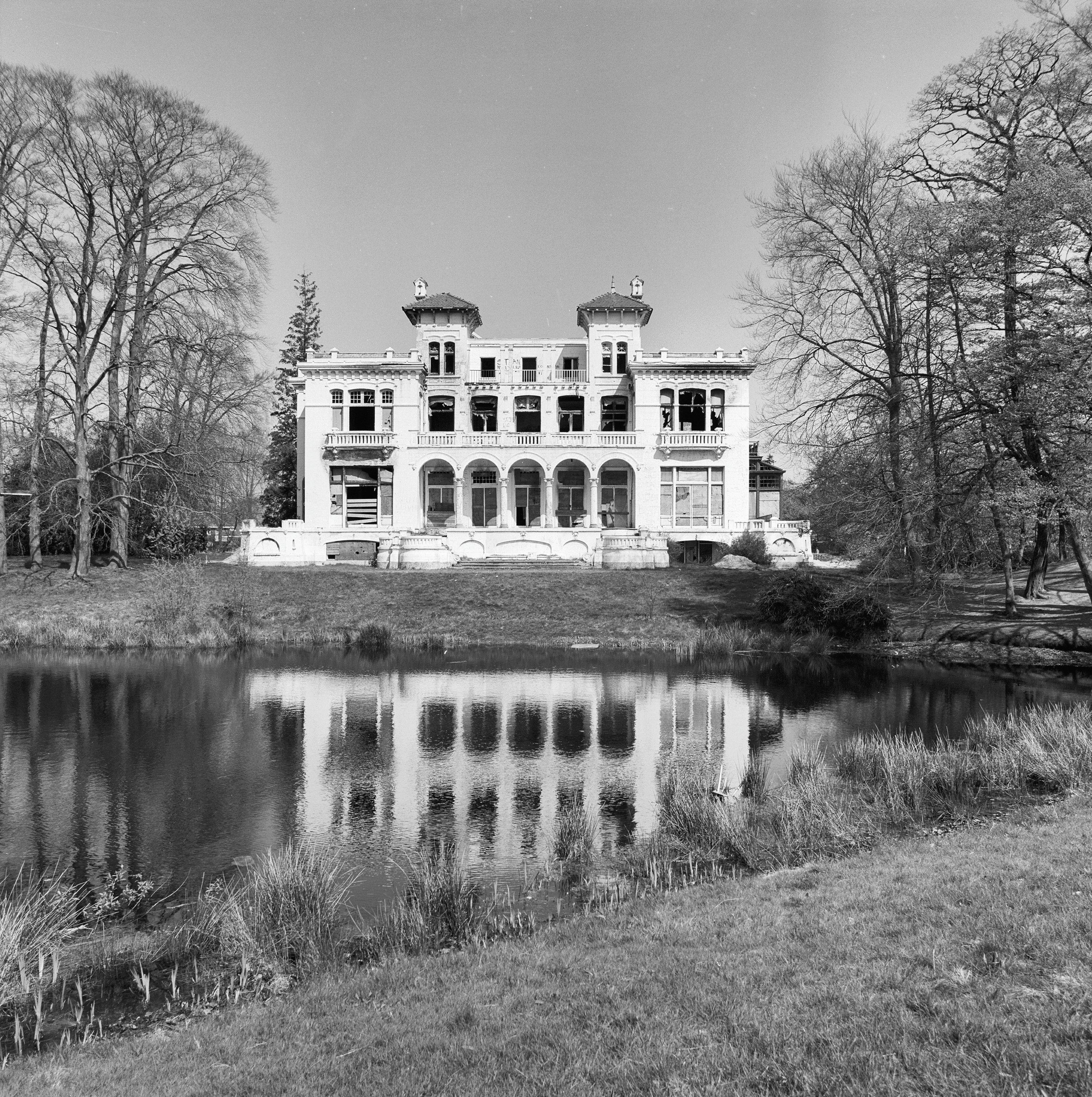 Huis Ma Retraite: Voorgevel